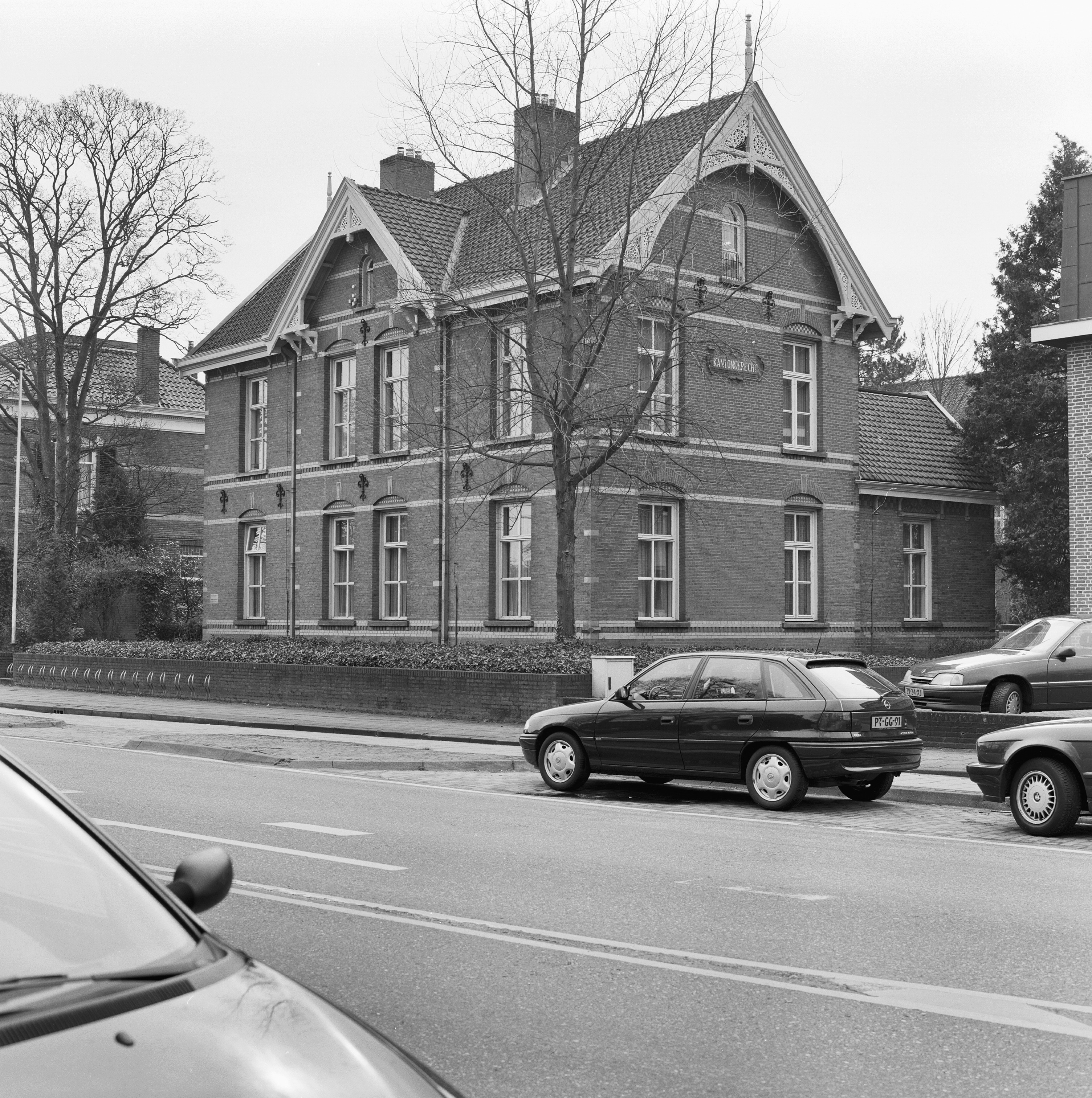 Kantongerecht: Overzicht voorgevel en rechter zijgevel (opmerking: Gefotografeerd voor Monumenten In Nederland Gelderland)